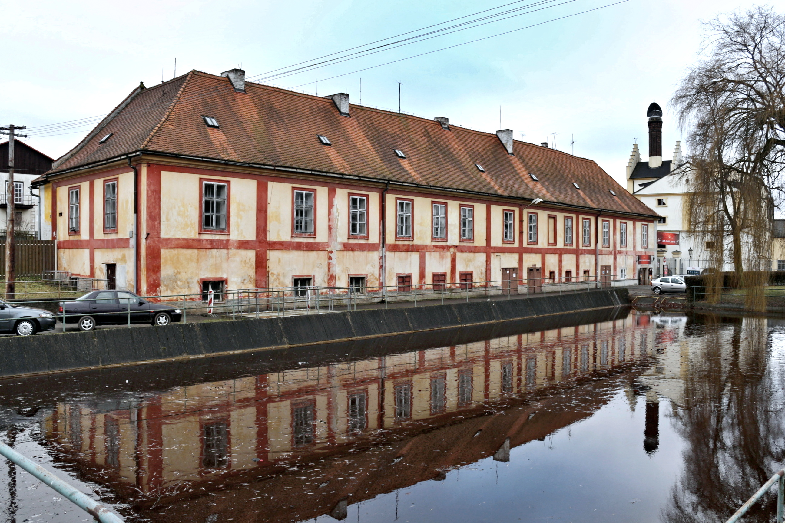 Zámek Krušovice